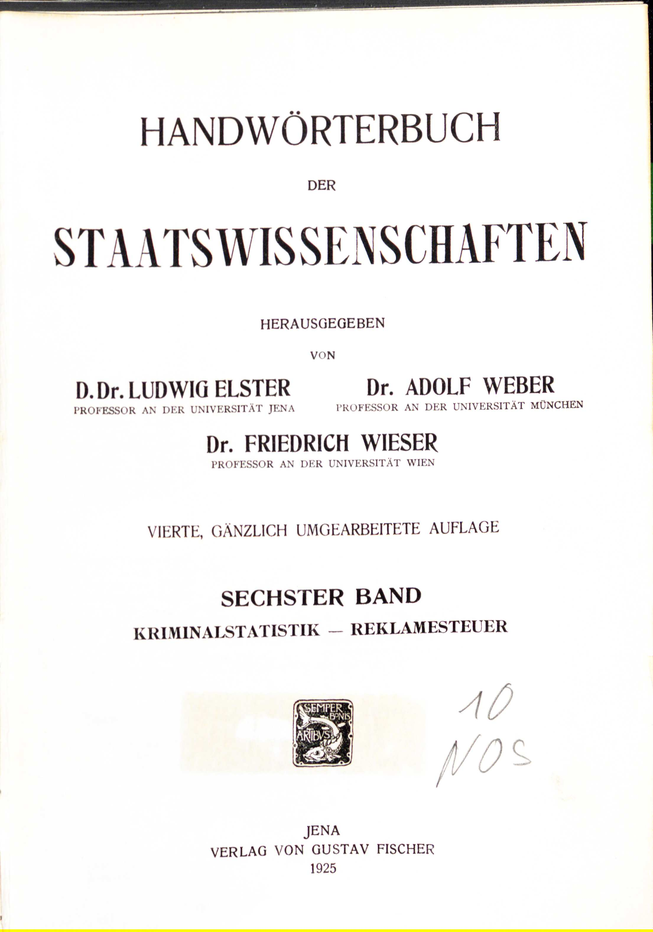 Handwörterbuch der Staatswissenschaften 4. Auflage Band 6 1925 Titel